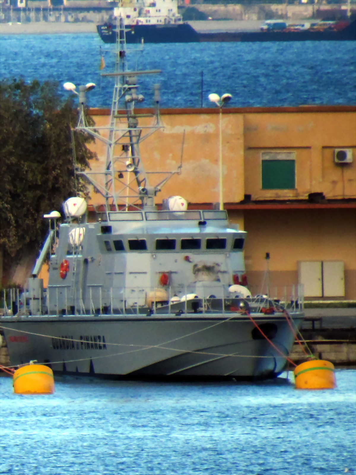 Pattugliatore Classe Bigliani ormeggiato a Messina